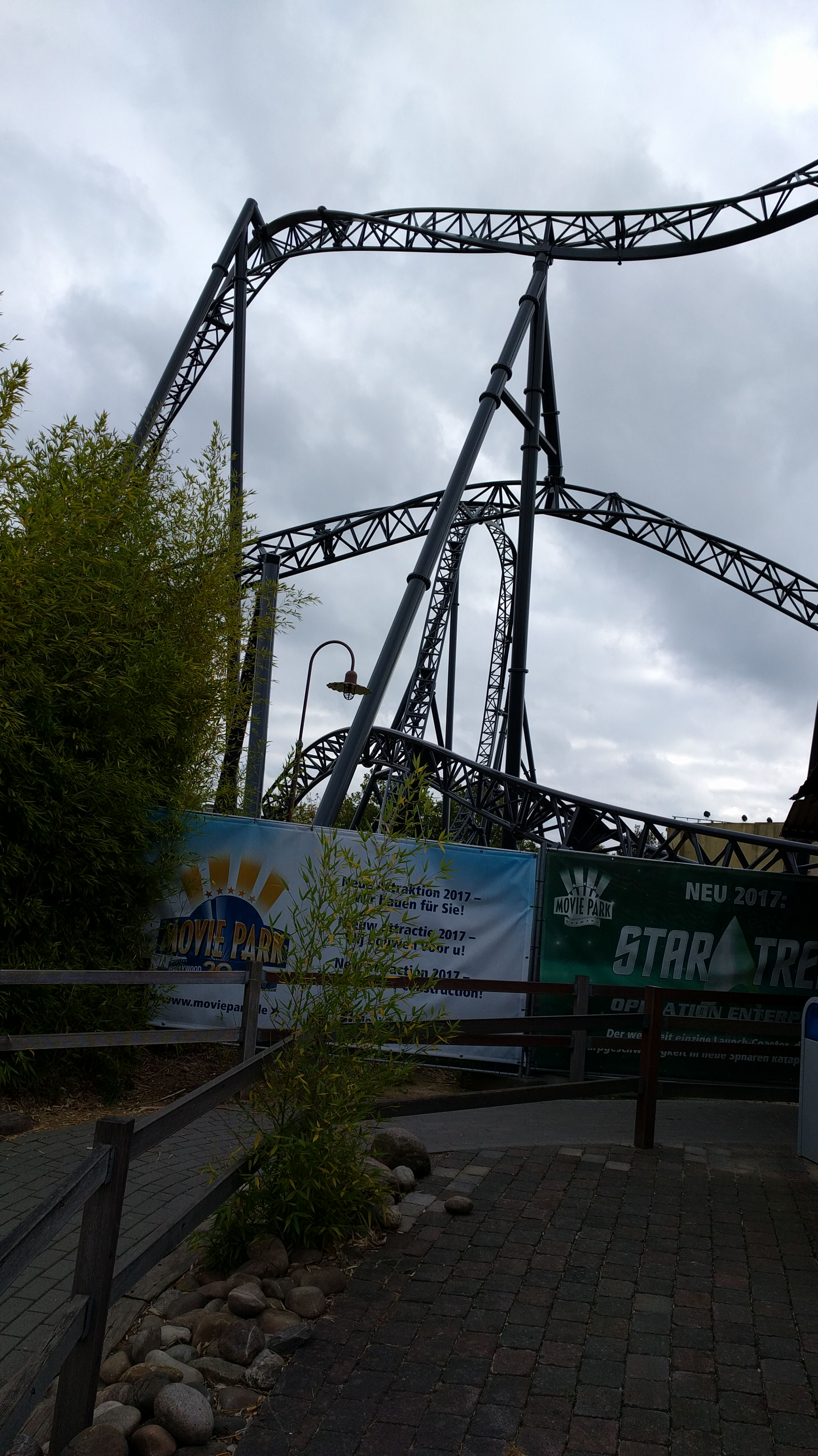 Blick von der neuen "Alien Encounter" Warteschlange